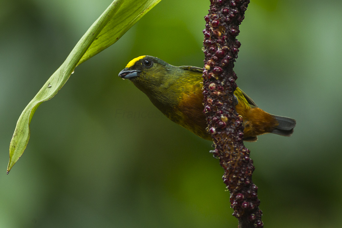 Olive-backed Euphonia .- Sarapiqui - Costa Rica_S4E0840